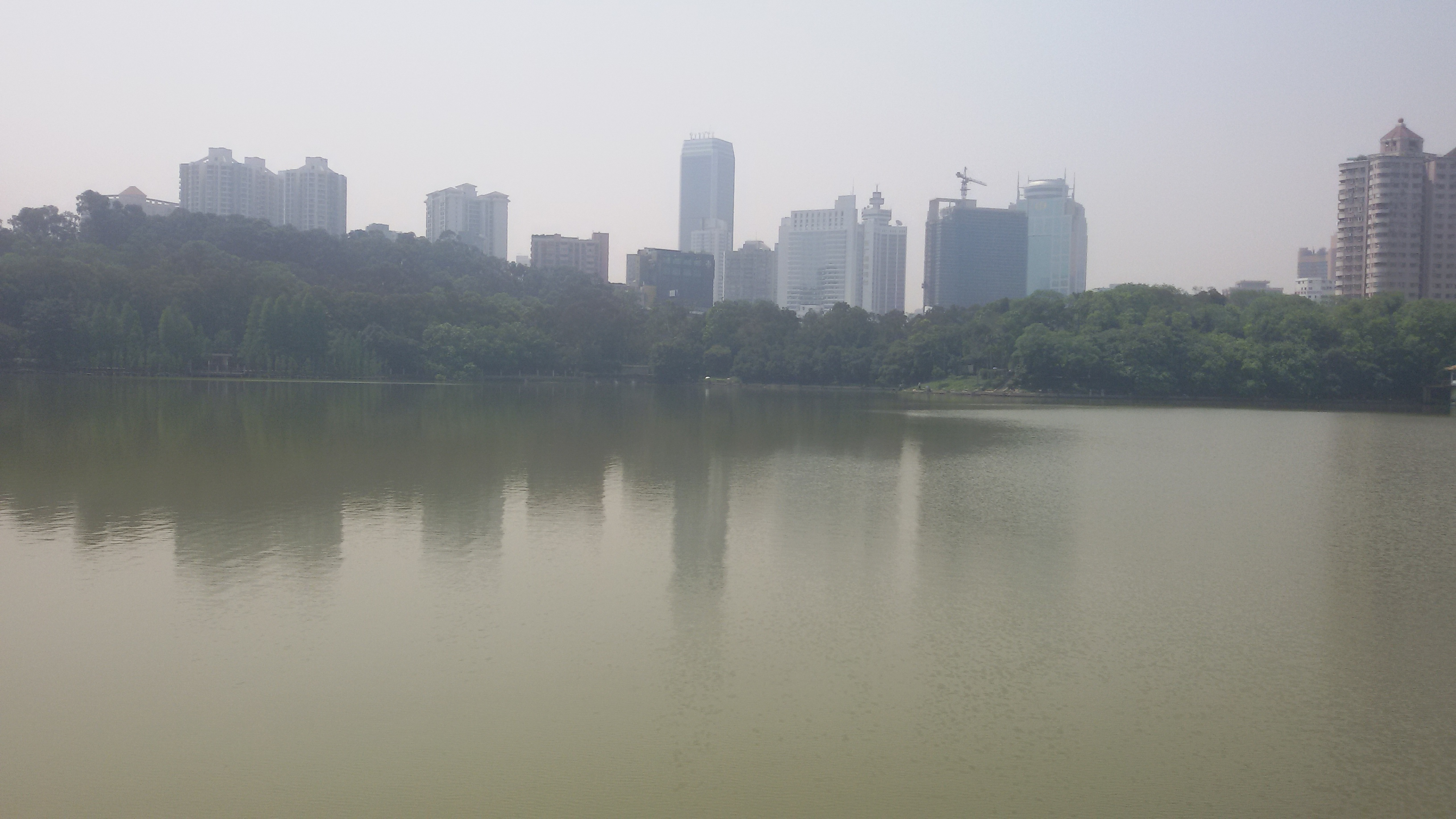 粵語: 麓湖公園西邊嘅湖邊